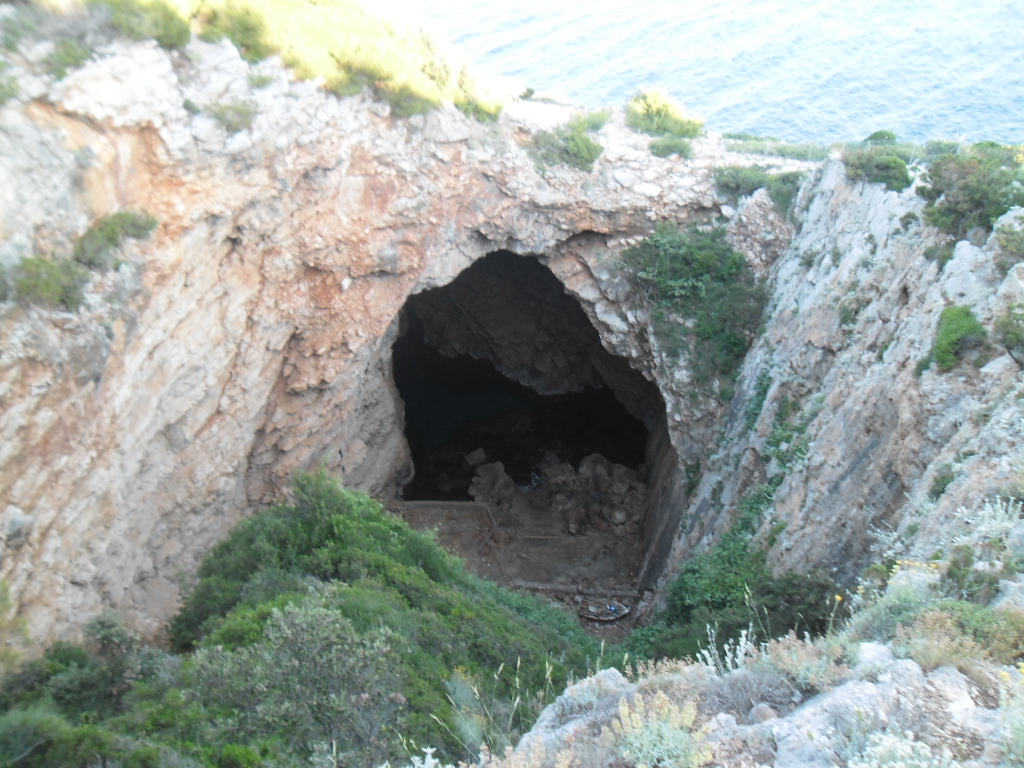 Odisejeva špilja na otoku Mljetu